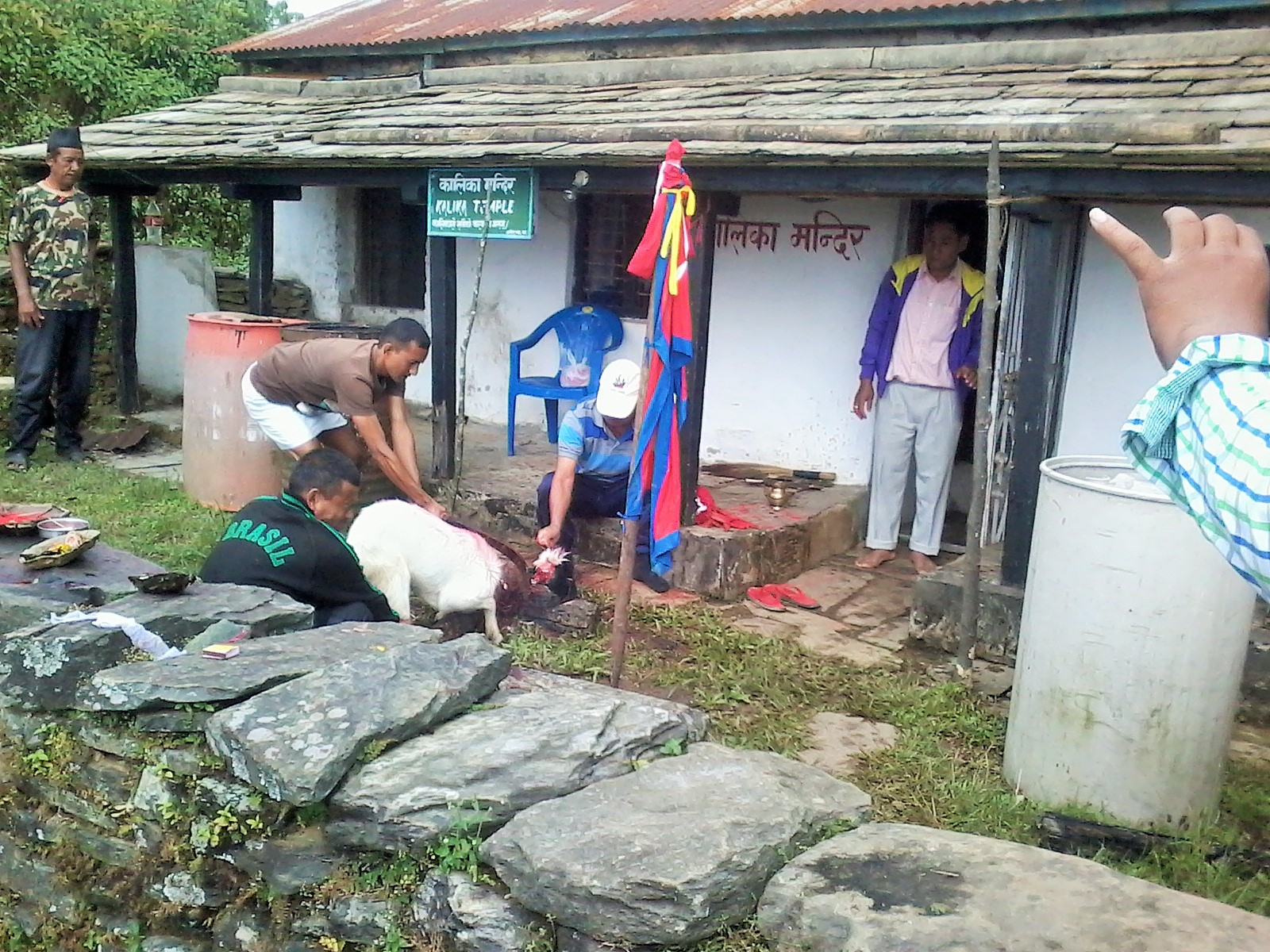 नेपाली: कालिका मन्दिर